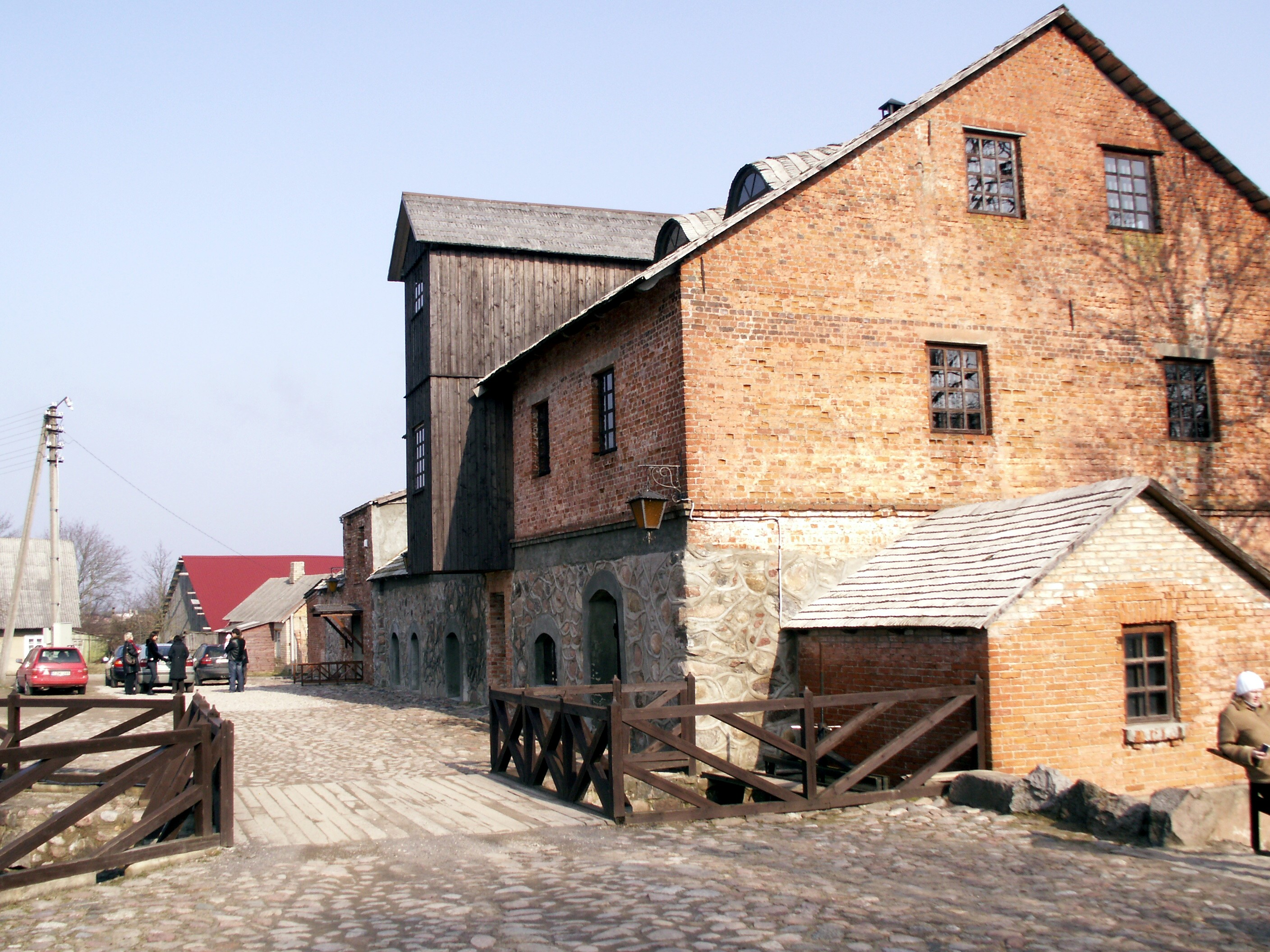 Užvenčio malūnas